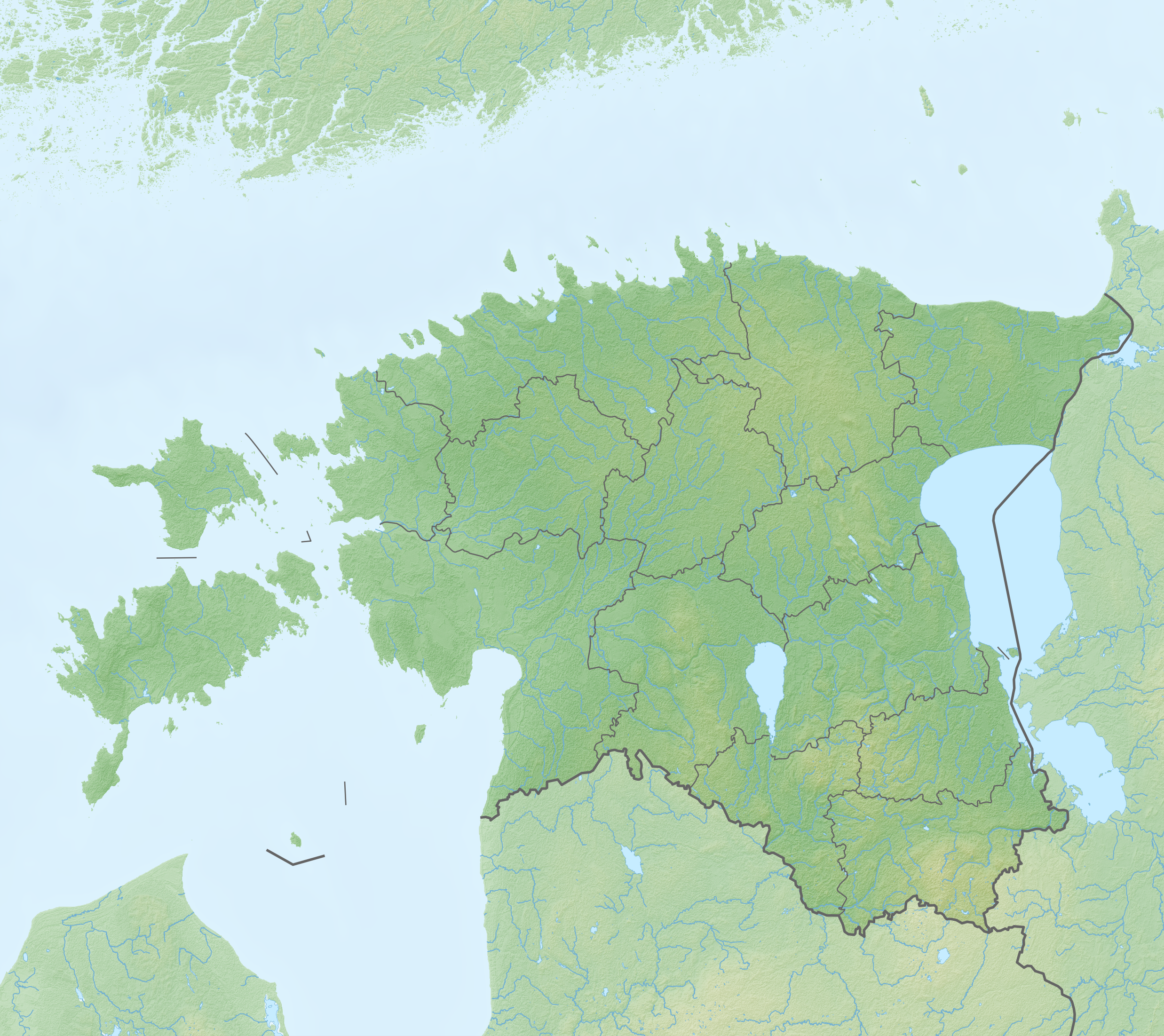 Reliefkarte Estland Topographischer Hintergrund: NASA Shuttle Radar Topography Mission (public domain). SRTM3 v.2. Grenzverläufe: File:Estonia adm location map.svg